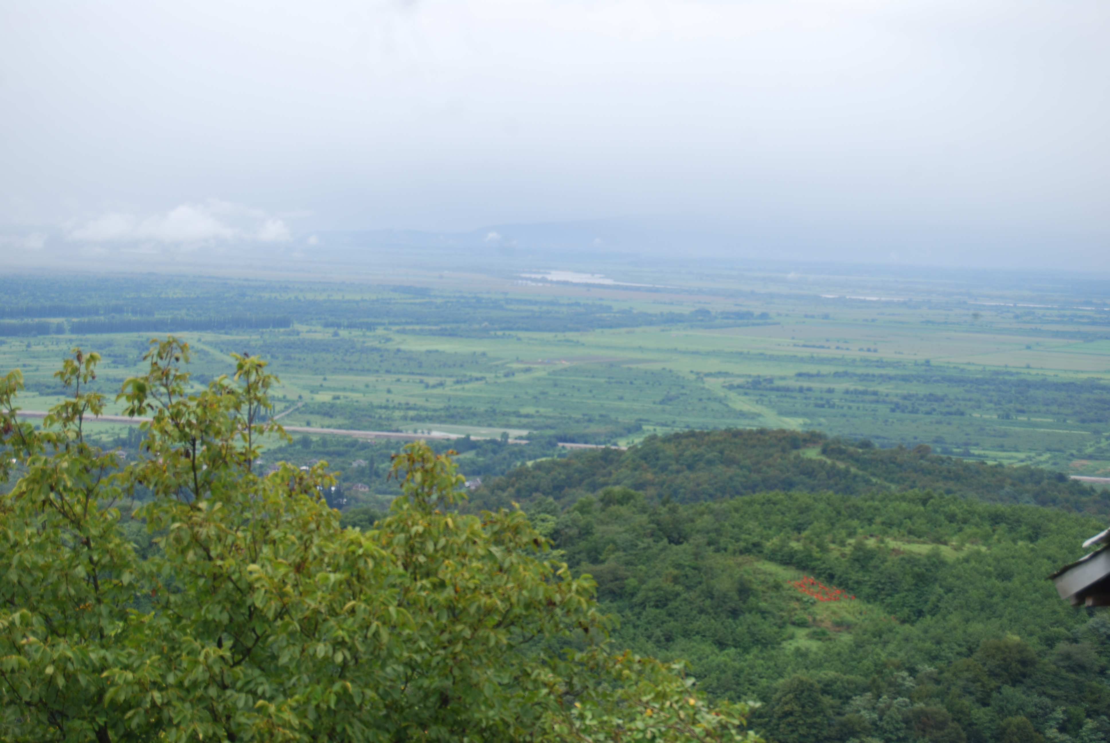 ოდიშ-გურიის დაბლობი, ხედი ჯიხეთის მონასტრიდან